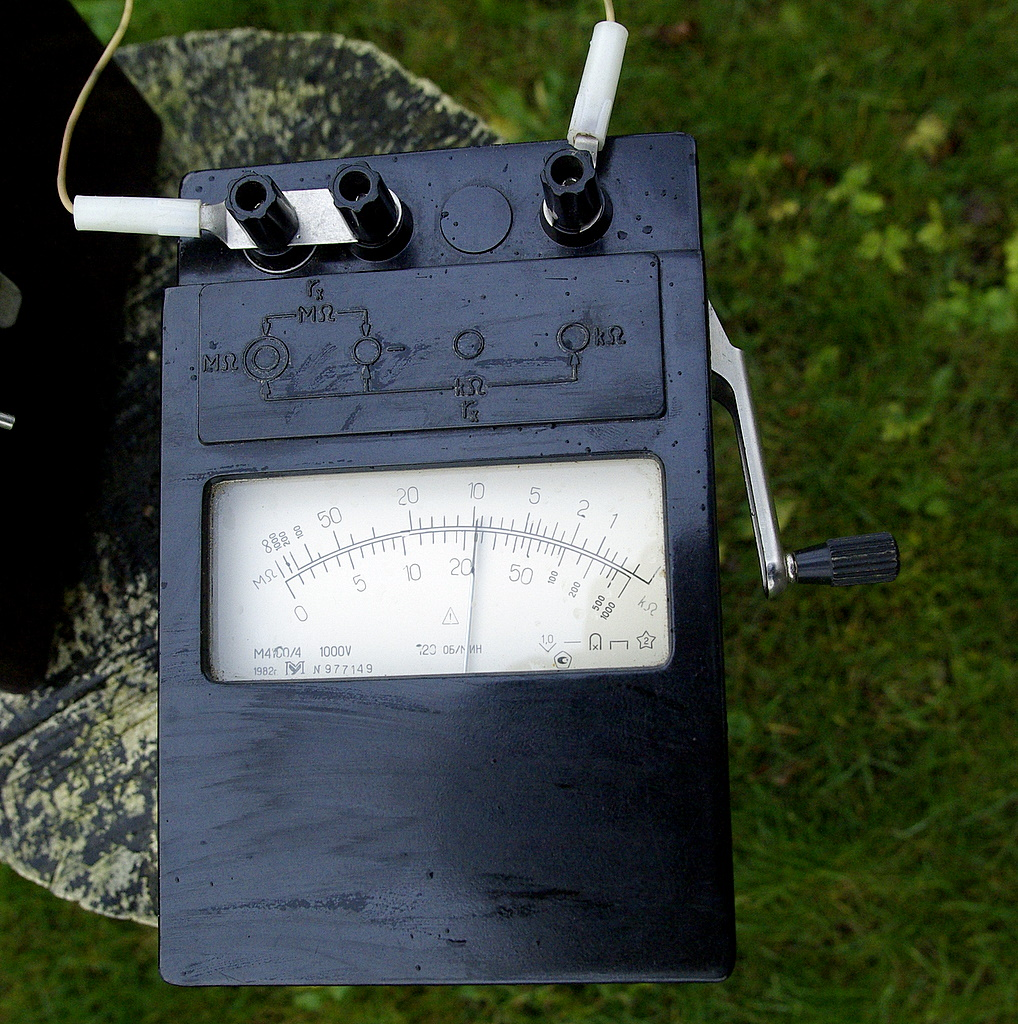 Meger M4100/4 pealtvaade